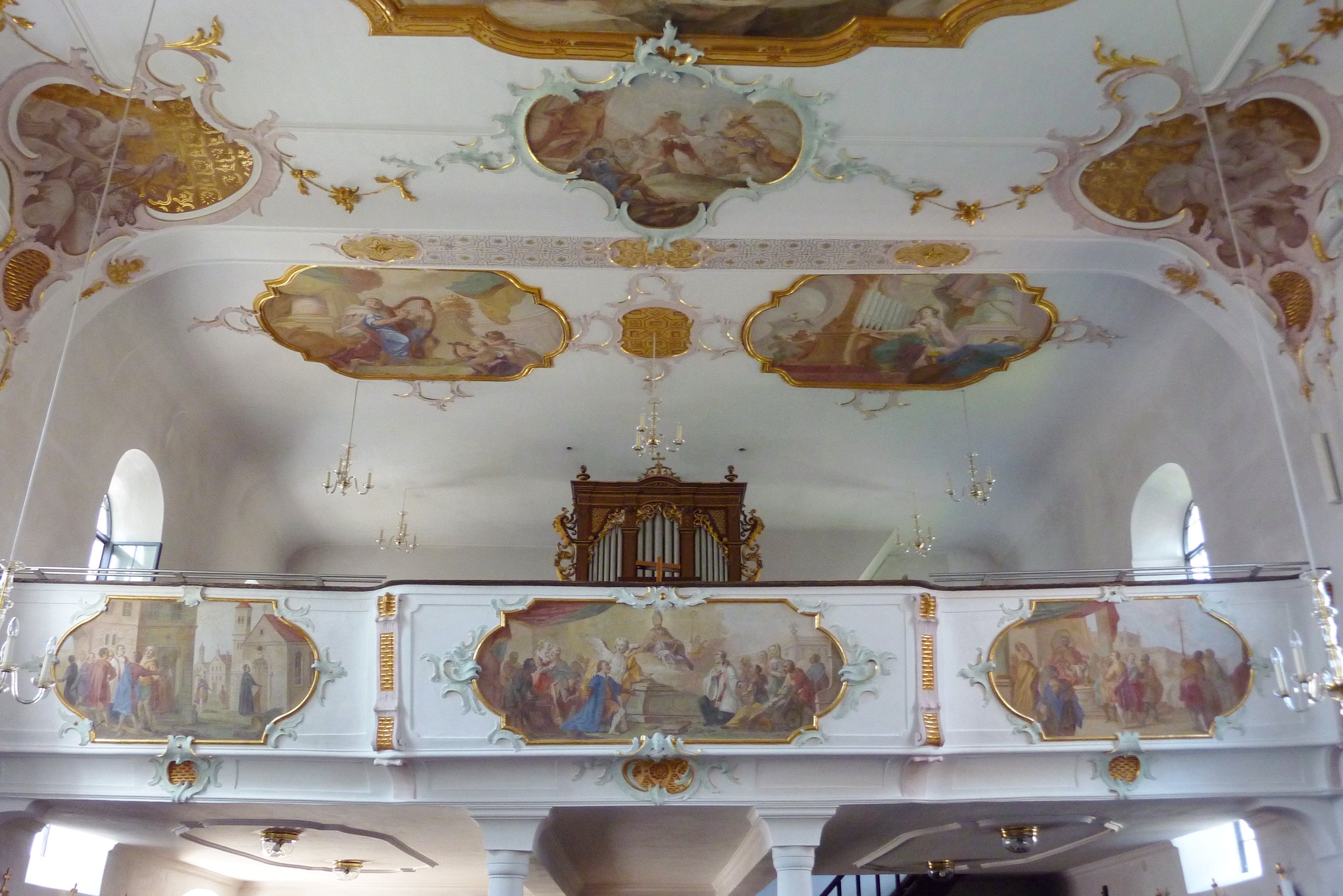 Katholische Pfarrkirche St. Nikolaus in Deisenhofen, einem Stadtteil von Höchstädt an der Donau im Landkreis Dillingen an der Donau (Bayern), Chorturmkirche (15./18. Jahrhundert), Empore mit Fresken von Johann Anwander, Darstellung: Szenen aus dem Leben des hl. Nikolaus